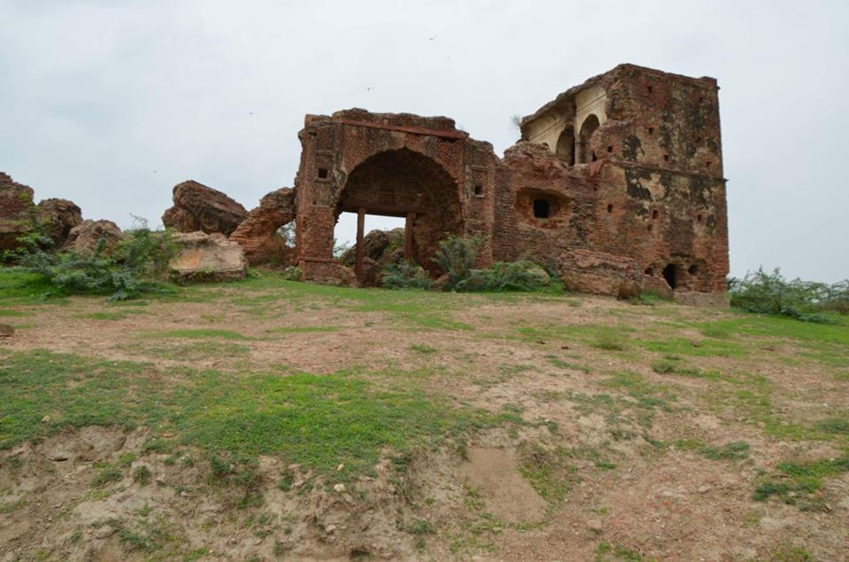 यह अडिंग का किला है